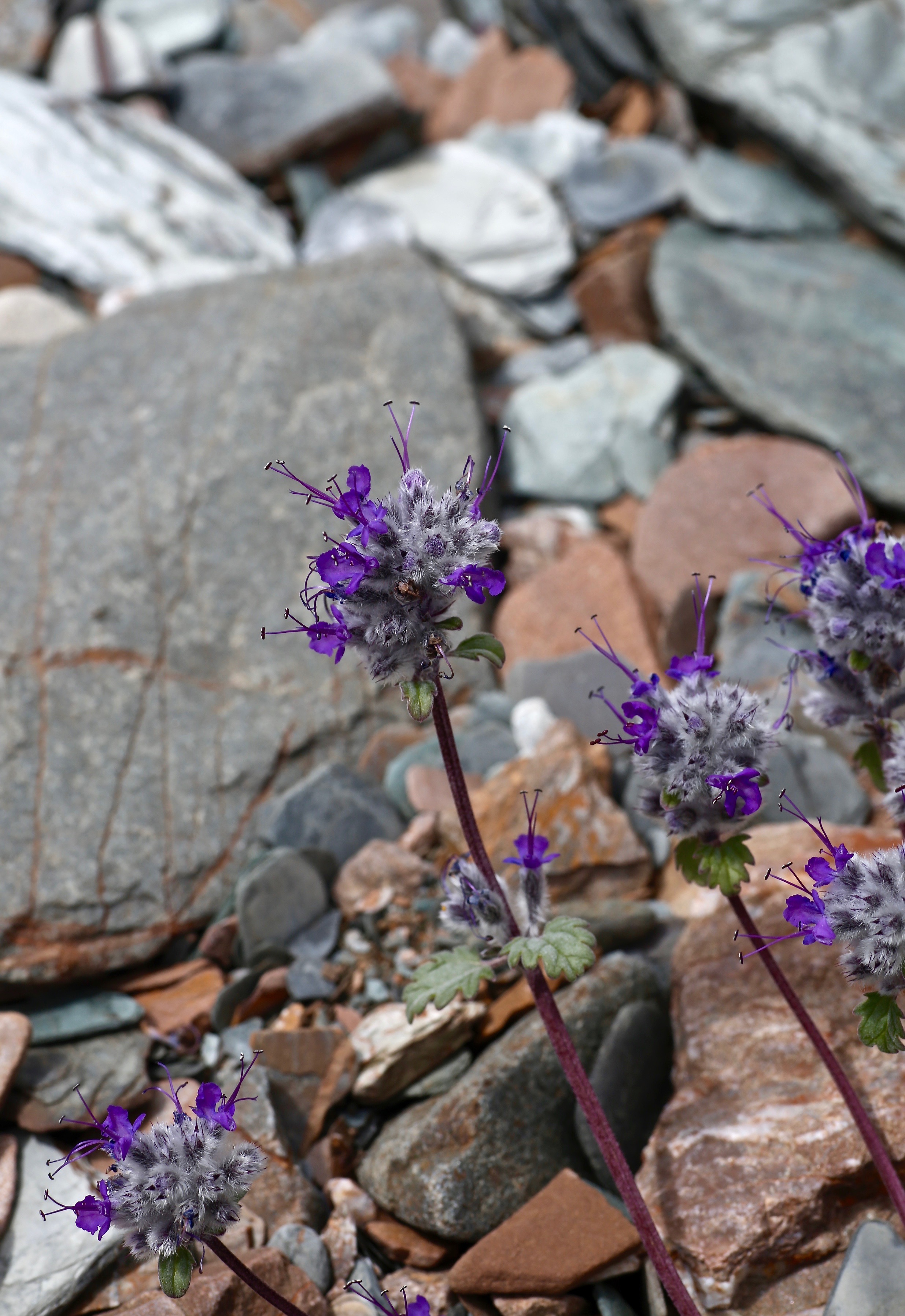 Kyrgyzstan, Close to Bedel Pass, 3800 m Rus: Киргизия, Иссык-Кульская обл., Жеты-Огузский р-н, хр. Терскей Ала-Тоо, перевал Барскаун, 3800 м н.у.м. 7 августа 2015 г.